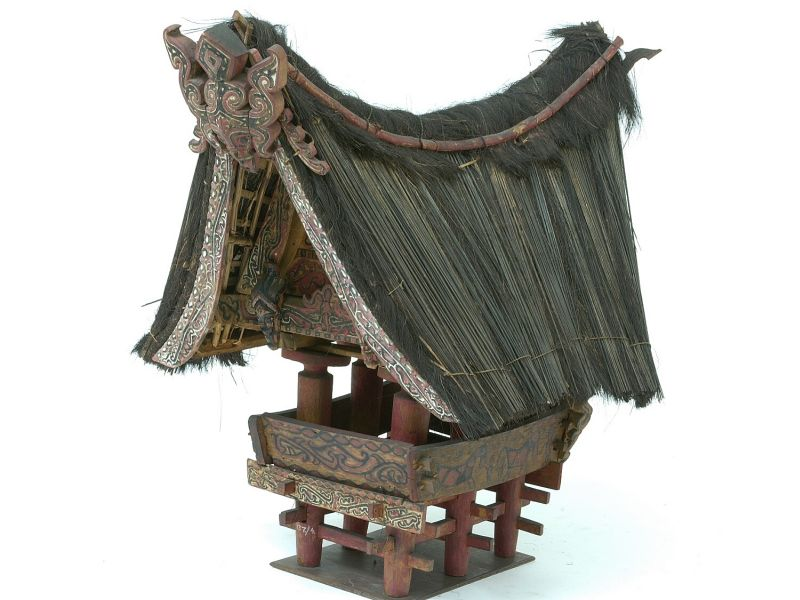 Huismodel. Vrij groot model van een Toba-Batak rijstschuur, met een platform dat gebruikt werd als vergaderplaats en voor het ontvangen van vreemdelingen. De rijstschuur werd ook benut als slaapplaats voor jongelingen en logees. Het model staat op een gestel van hoge palen, die naar boventoe kegelvormig verdikt zijn, geheel bovenaan verdund inlopen verdun en verder omhoog besneden zijn tot vrij grote schijven. Deze vorm diende te voorkomen dat muizen naarbinnen klommen. . Model van een Toba-Batak rijstschuur Unknown language: Sopo